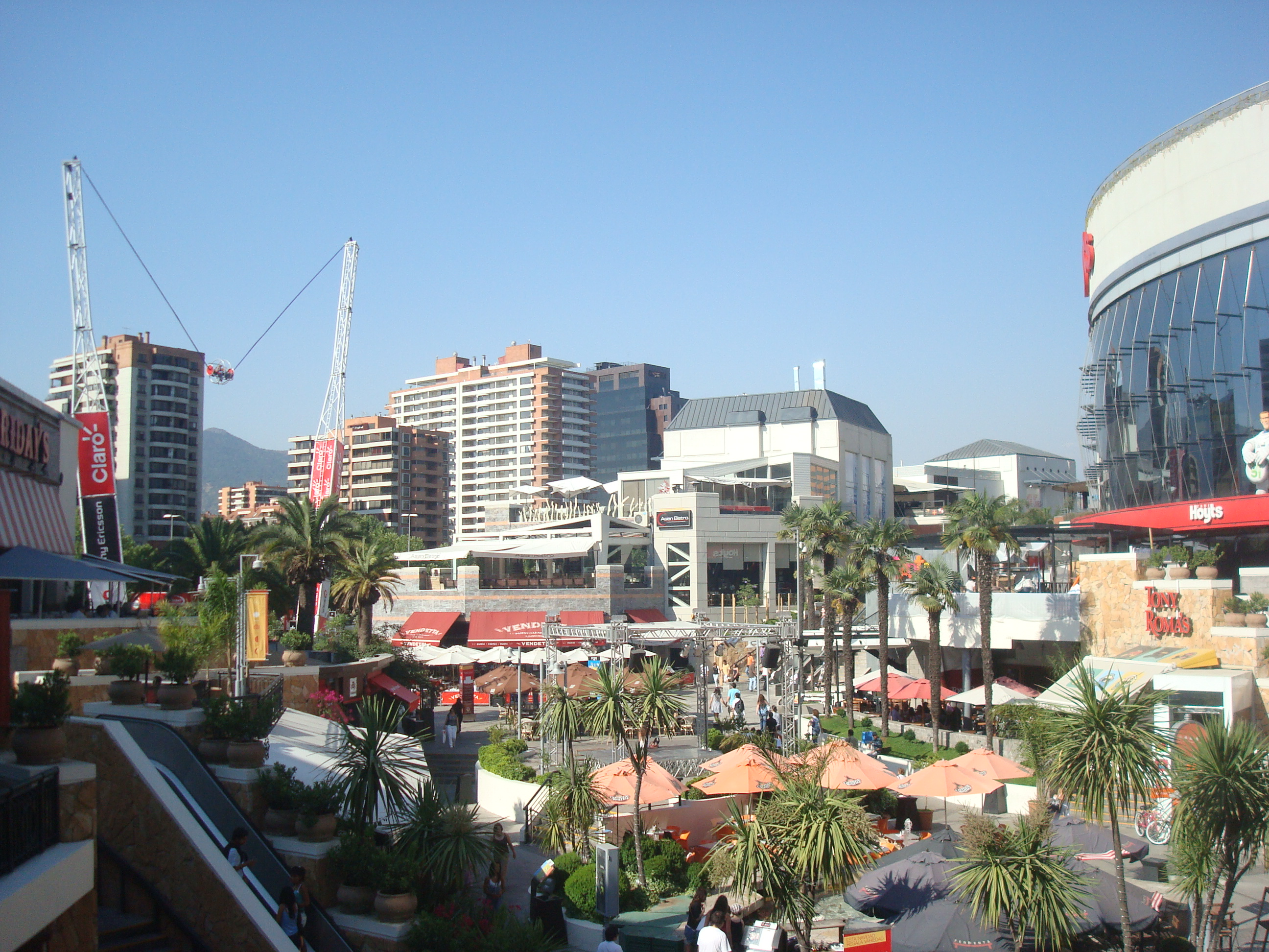 Boulevard Parque Arauco, Santiago de Chile